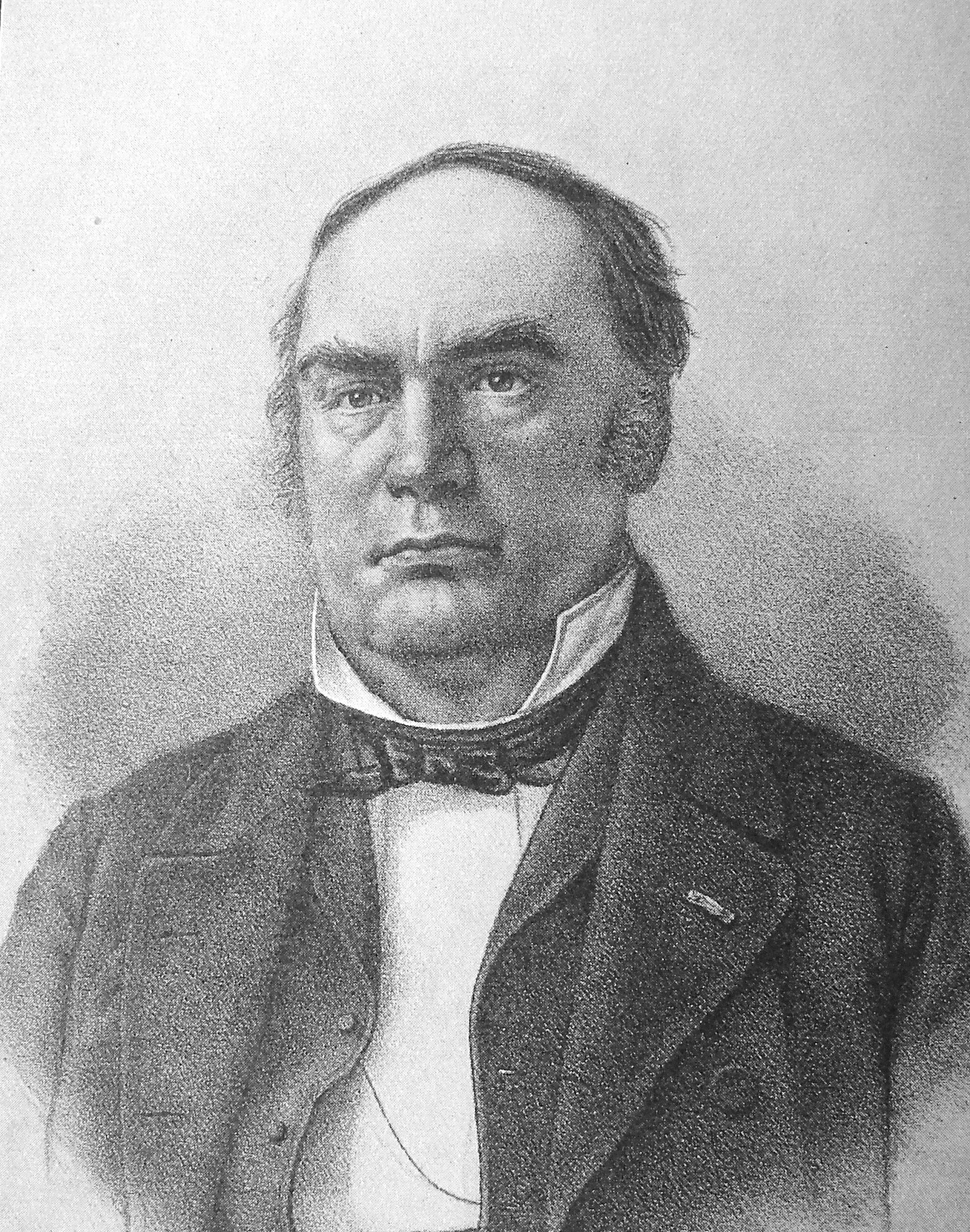 Caspar Paludan-Müller (25. januar 1805 - 1. juni 1882) var en dansk historiker.